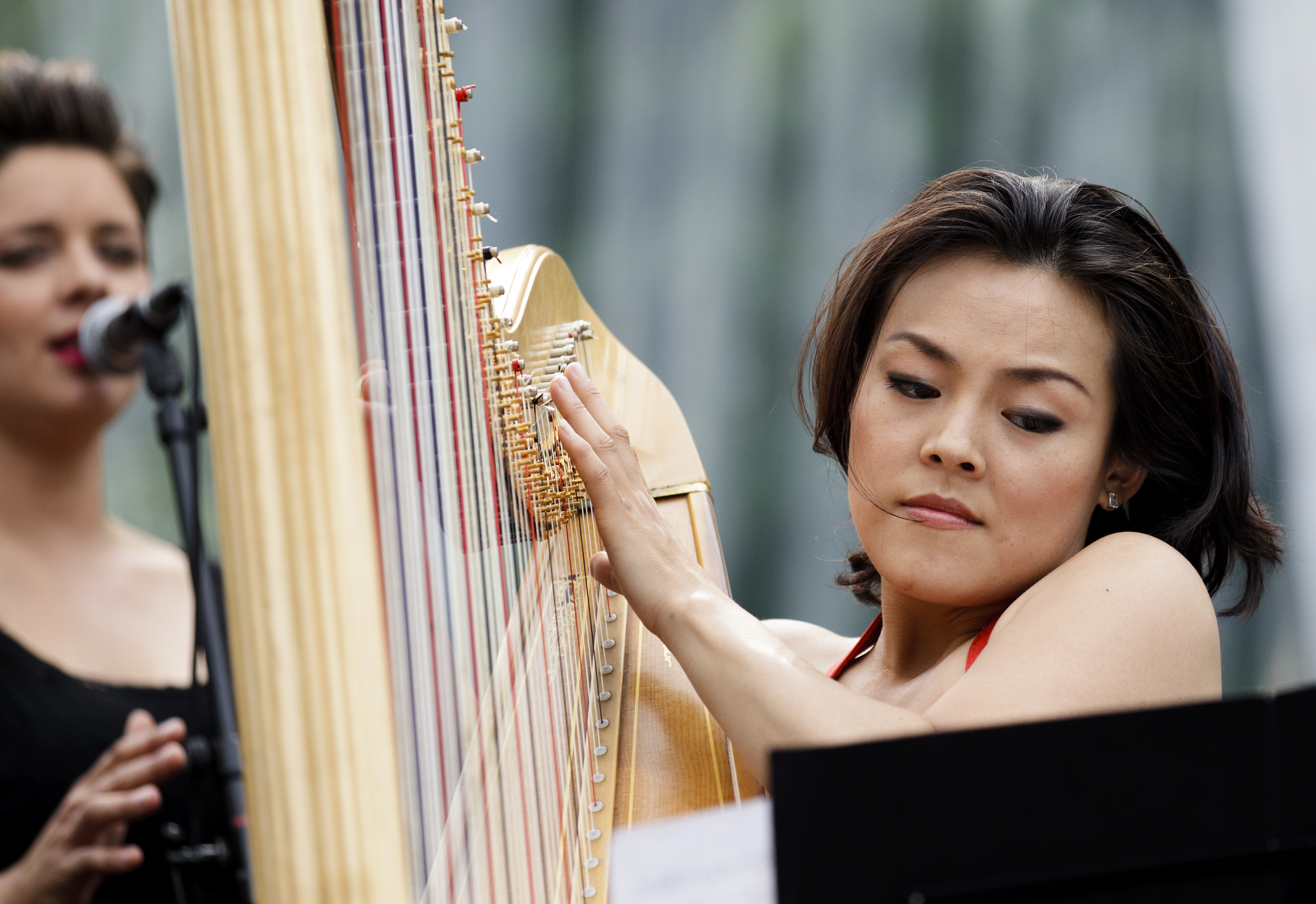 Lavinia Meijer tijdens het Nationaal Concert 2011 Lavinia Meijer tijdens het Nationaal Concert 2011